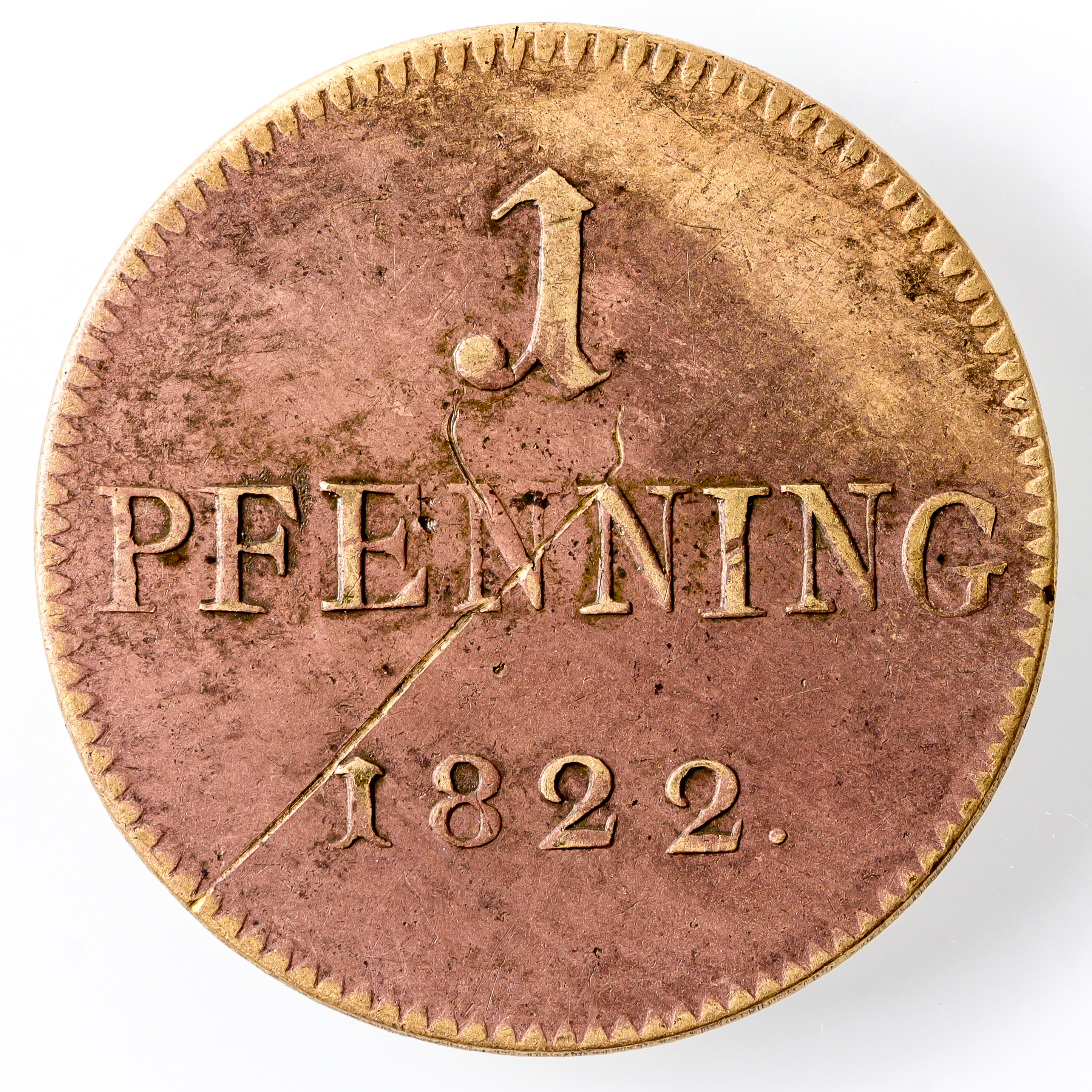 Judenpfennig 1 Pfenning 1822